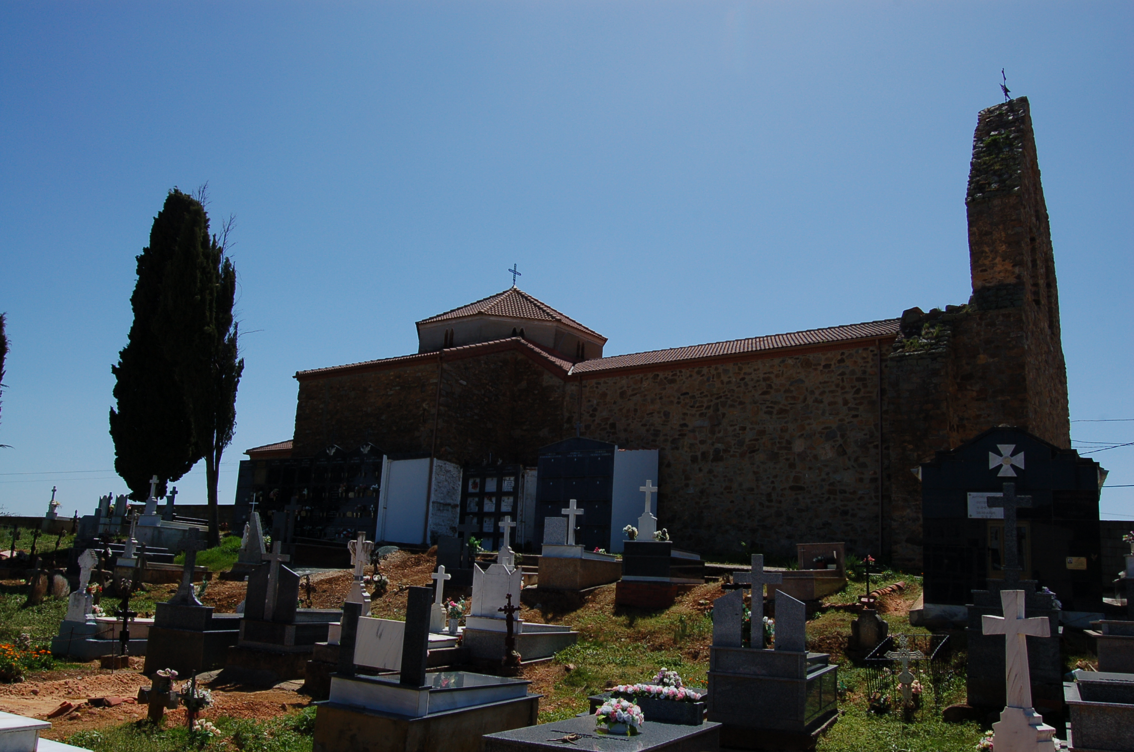 Igrexa e cemiterio de Brime de Sog